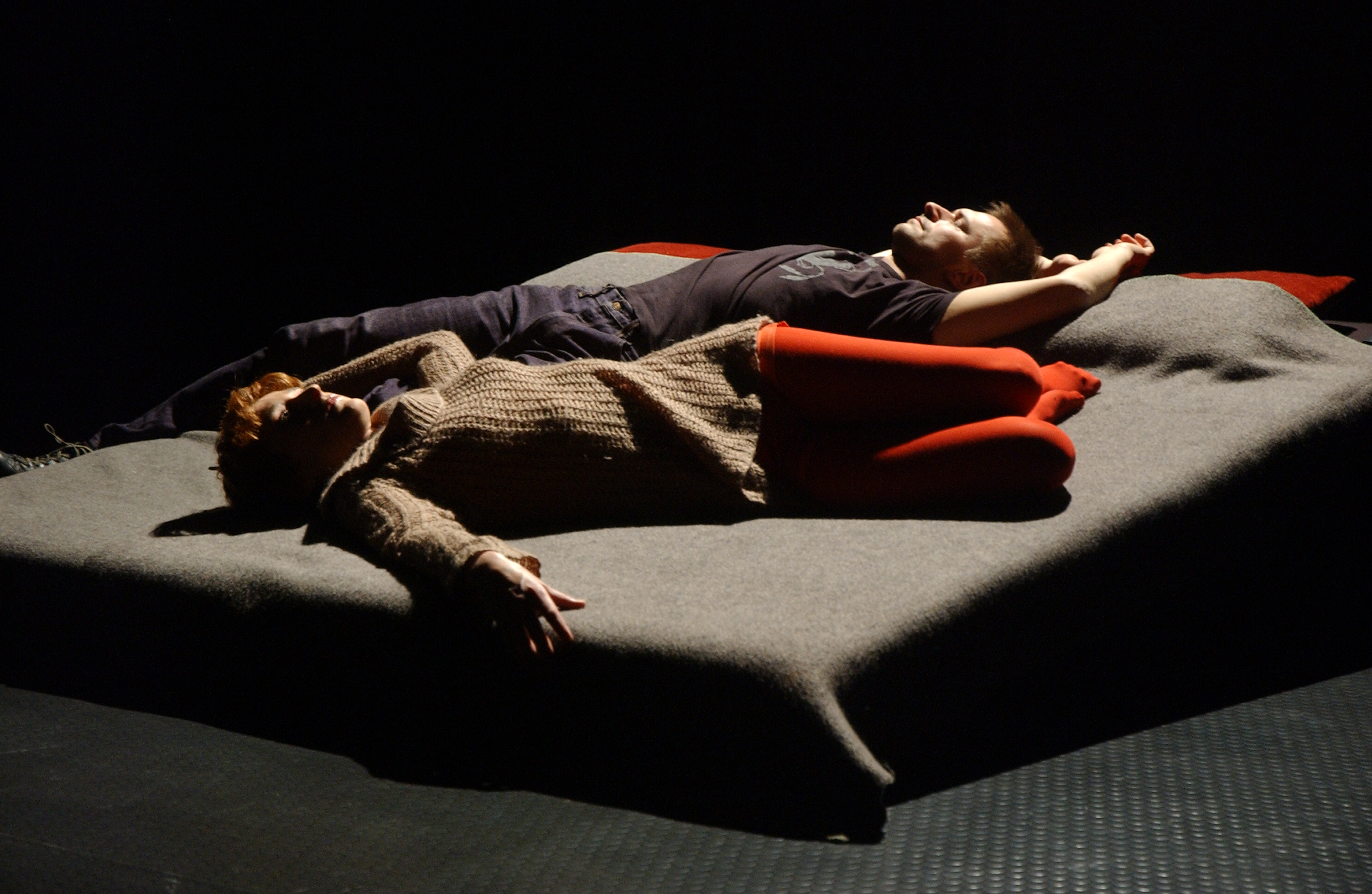 Agnieszka Sitek i Waldemar Barwiński, spektak "Drugi pokój", teatr tm.